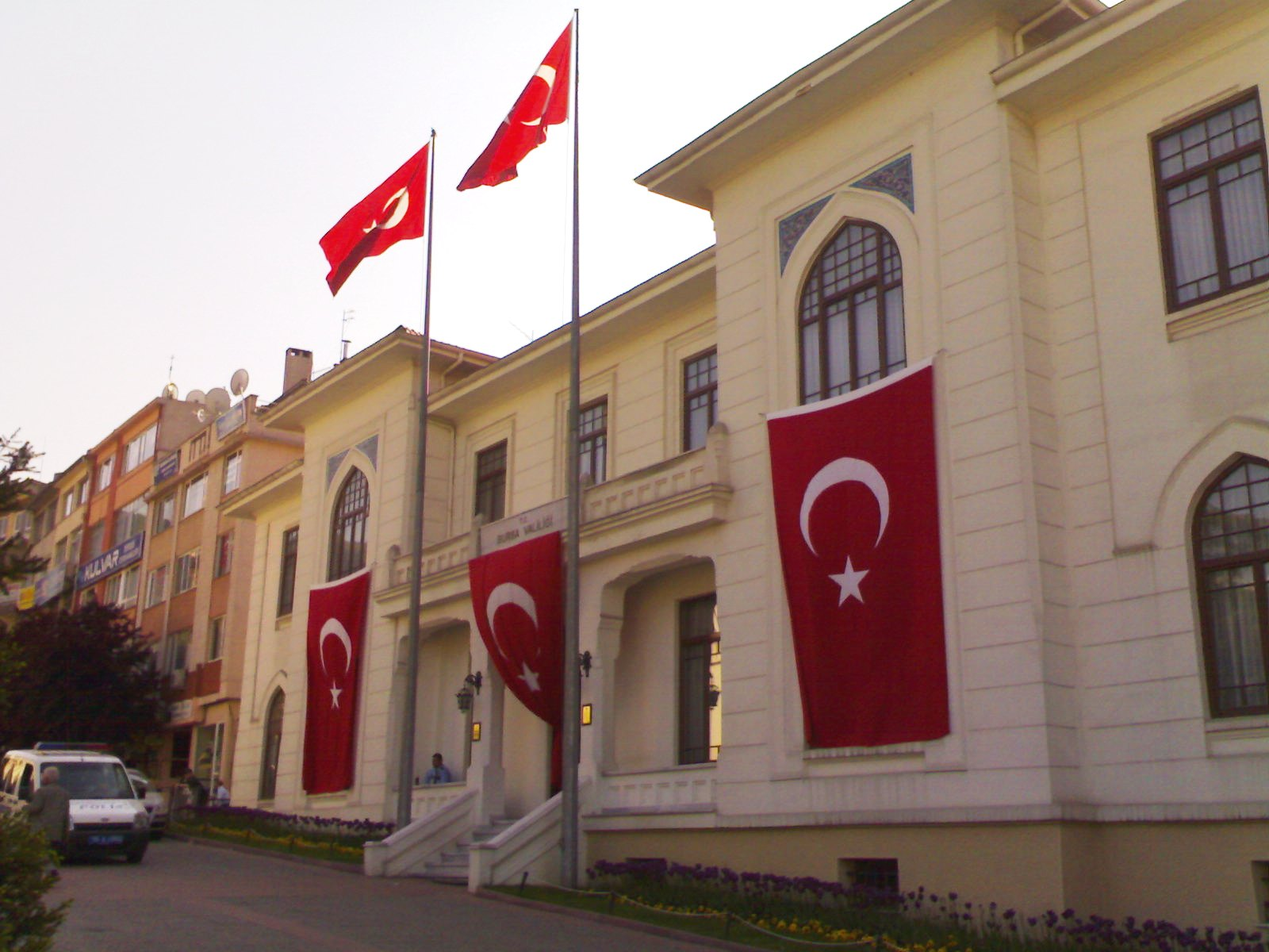 Bursa (Tarihi) Valilik Binası